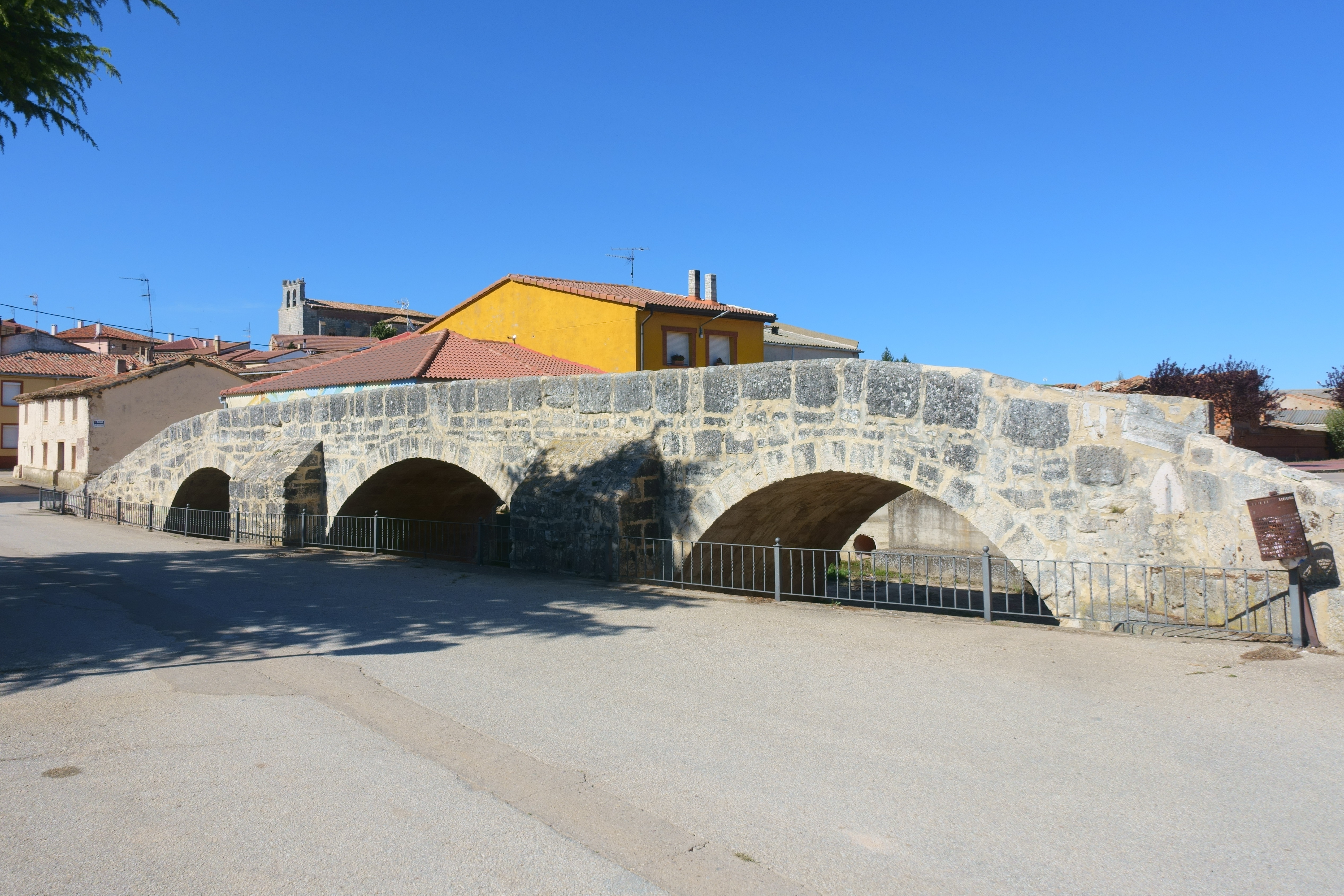 Puente en Villangómez (Burgos, España).